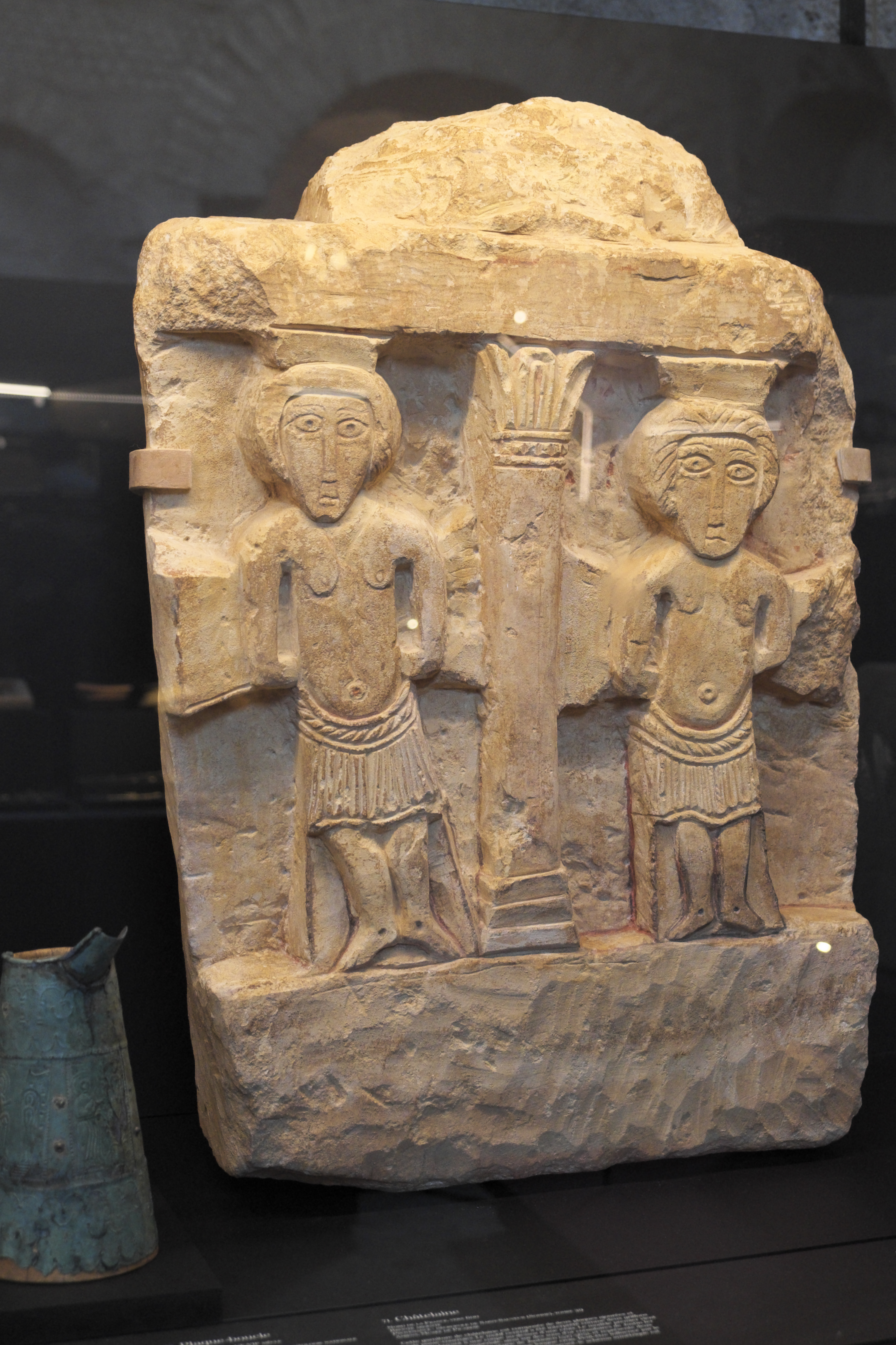 Musée national du Moyen Âge (Musée de Cluny) im 5. Arrondissement in Paris, Ausstellung: Les Temps mérovingiens; Sockel eines Kreuzes mit der Darstellung der beiden Schächer (Musée Sainte-Croix, Poitiers), aus dem 6./7. Jahrhundert